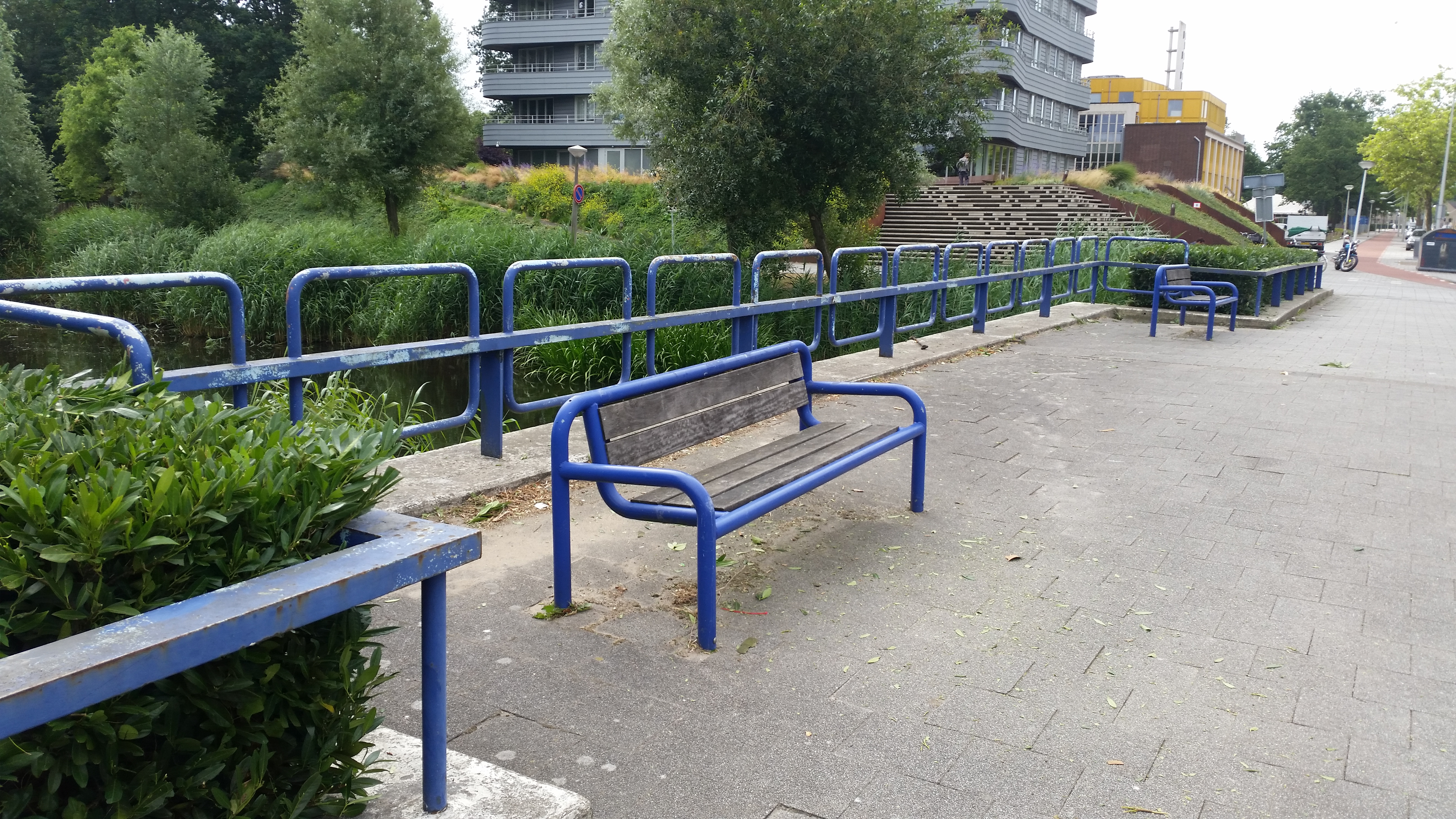 Brug 635 (in Amsterdam); balkon verbreding met zitbankjes